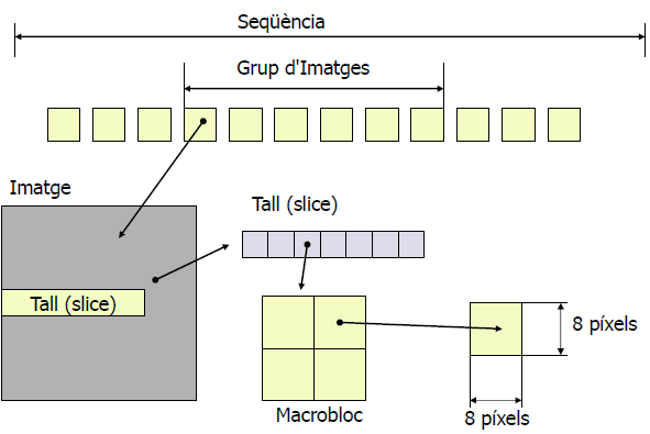 Exemple de deivisió d'una seqüència de vídeo.